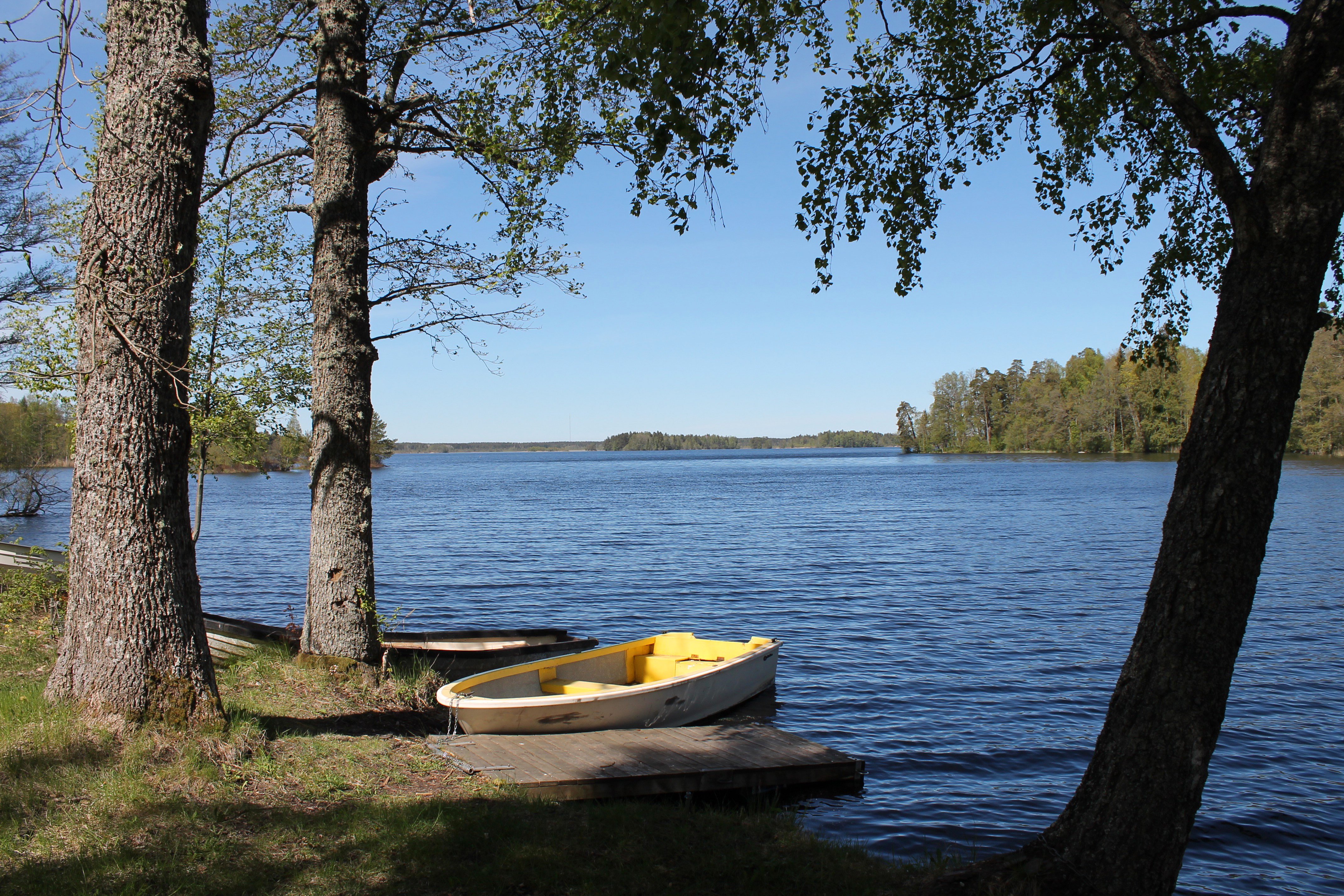 Girodammen fotad från söder, med en gul båt i förgrunden.